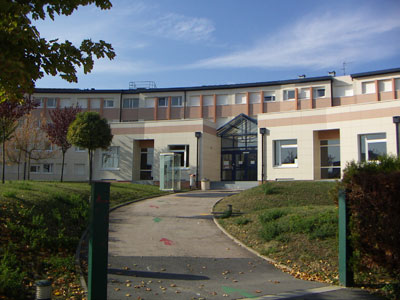 photo de l'internat du lycée Godart Roger d'Epernay